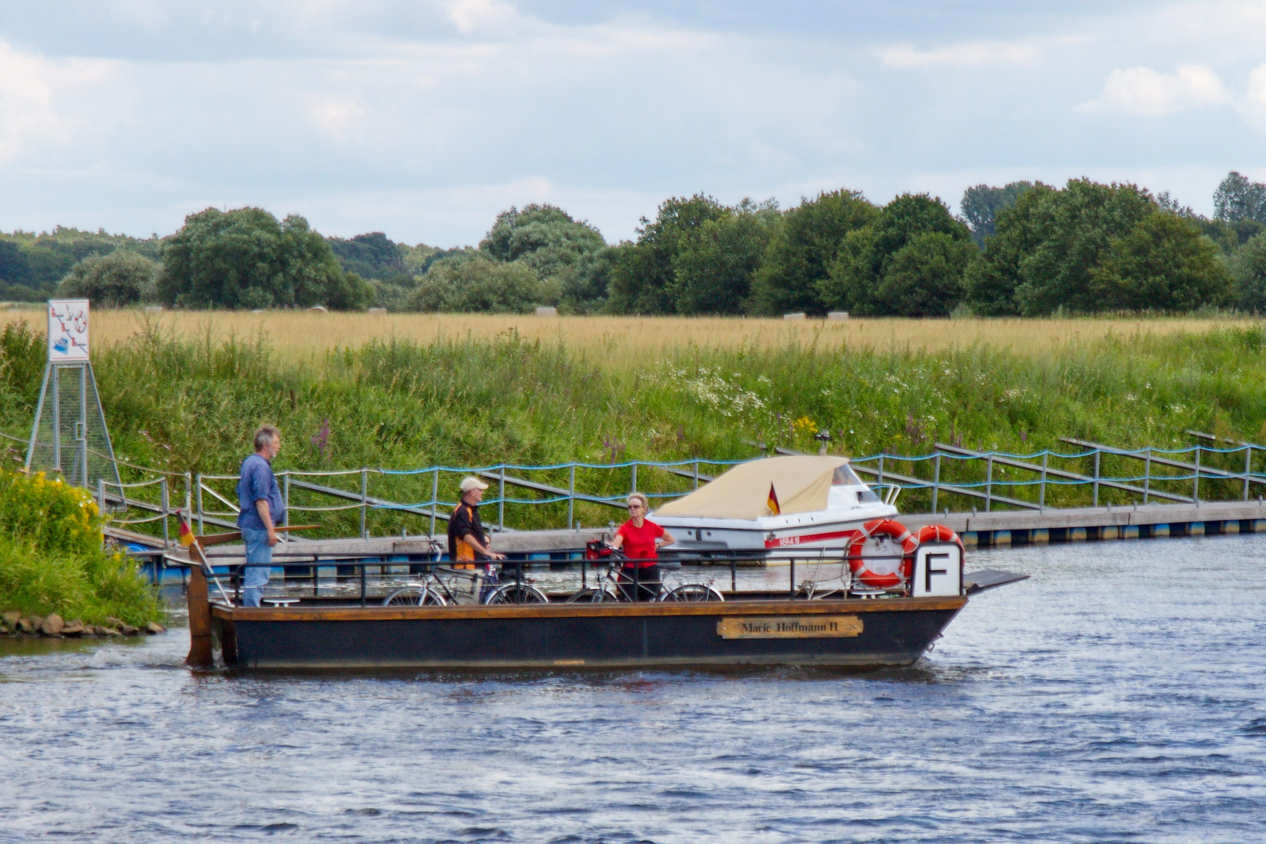 Die zweitkleinste Fähre Deutschlands wurde erstmals im 16. Jhd. in Betrieb genommen und verbindet die beiden Dörfer Westen und Otersen miteinander.